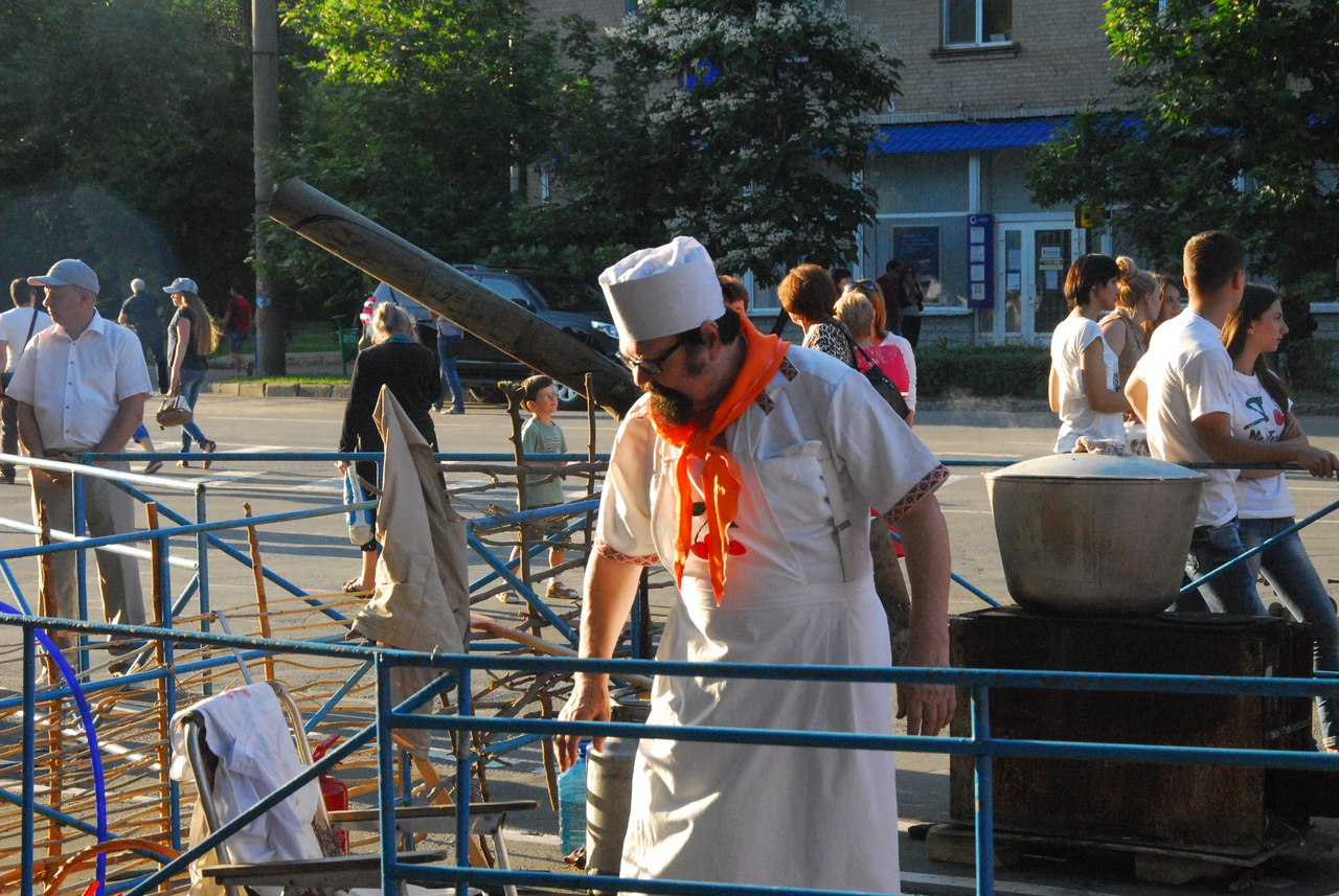 режиссер